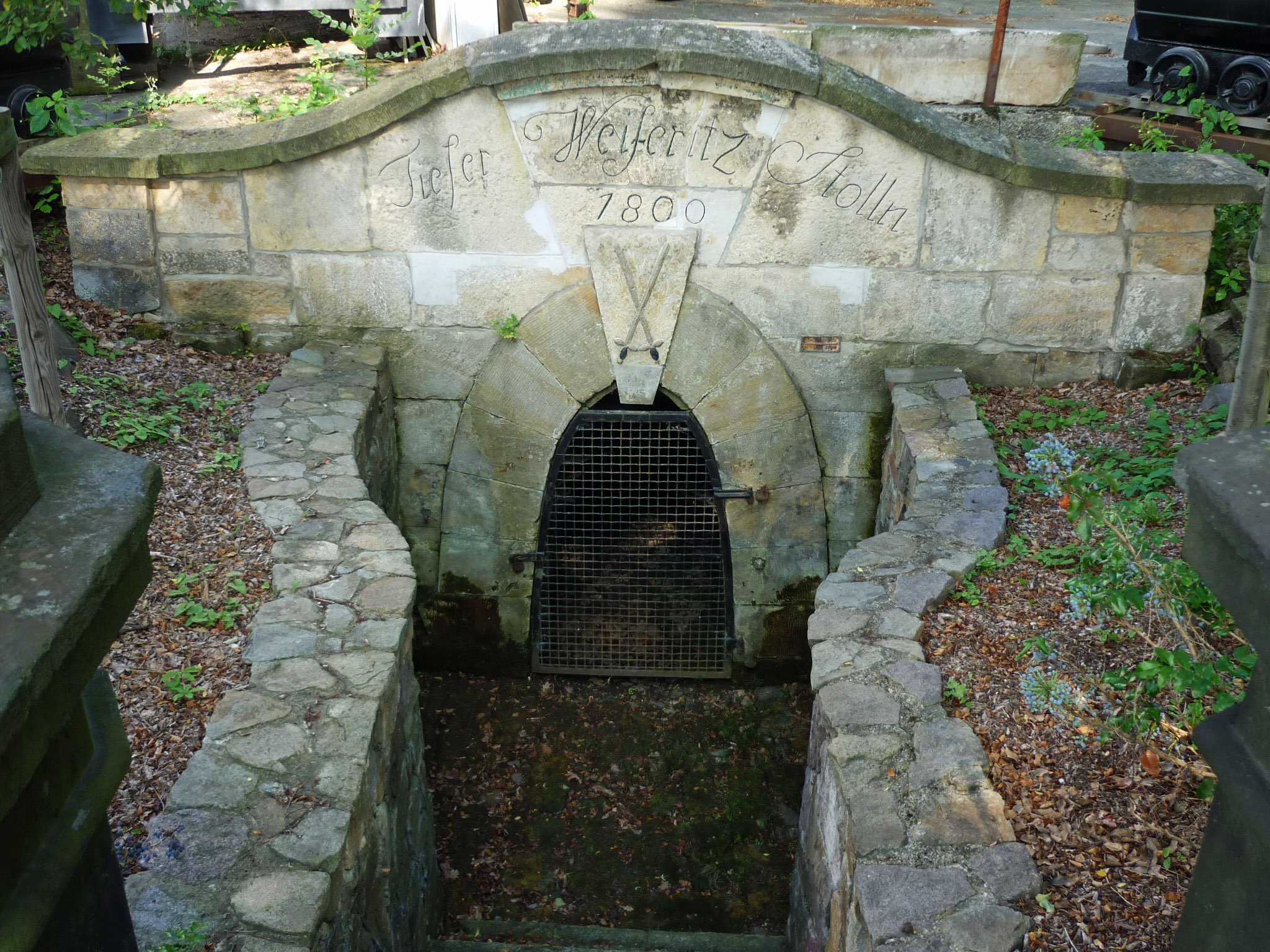 Tiefer Weißeritz Stollen (1800)